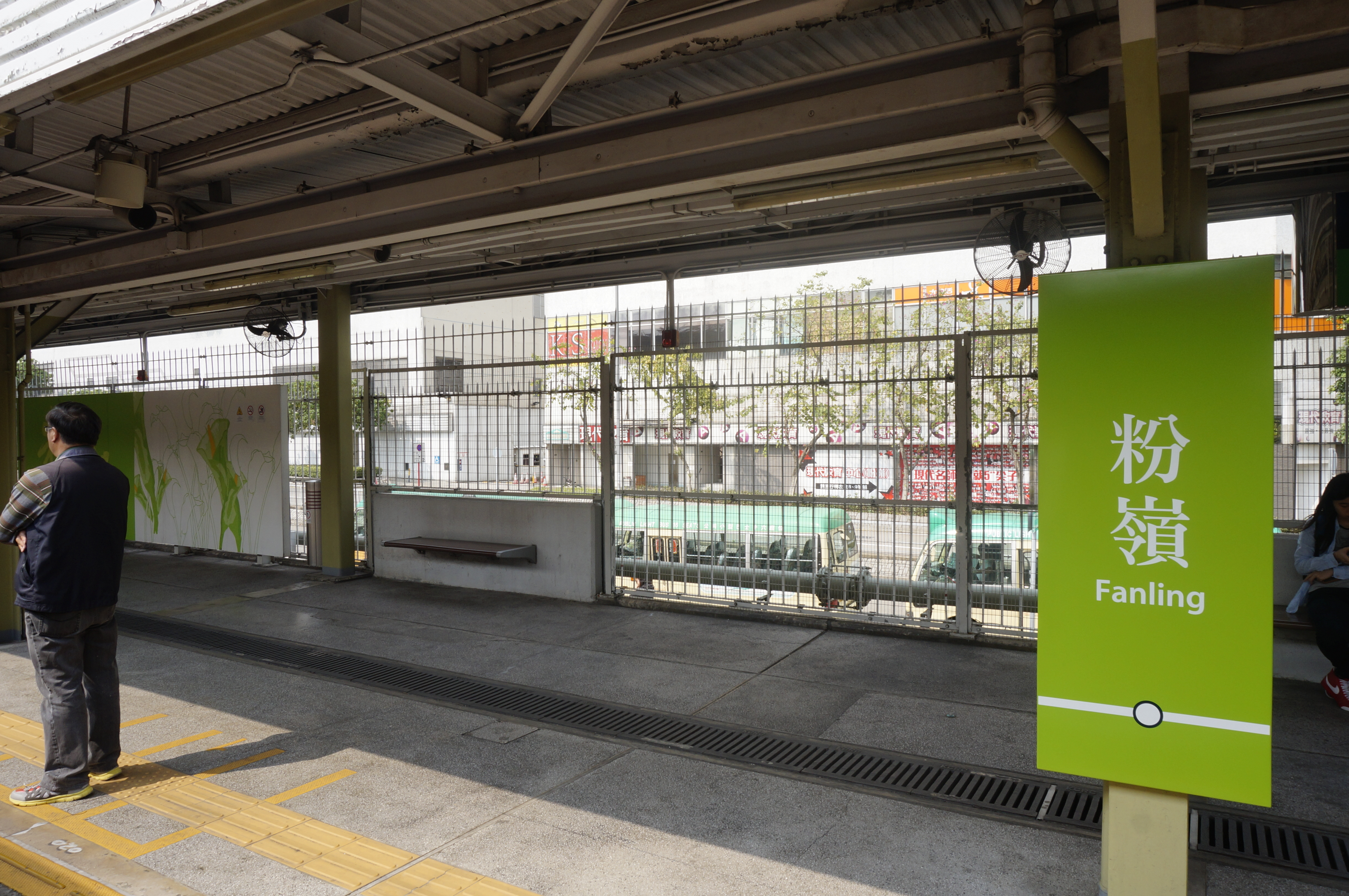 中文（香港）: 港鐵粉嶺站月台